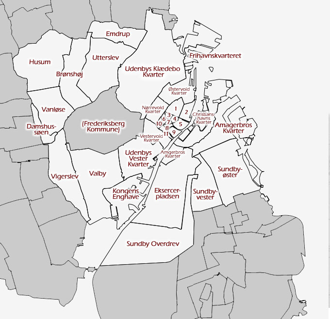 Ejerlav (matrikulære kvarterer) i København. 1. Sankt Annæ Vester Kvarter, 2. Sankt Annæ Øster Kvarter, 3. Rosenborg Kvarter, 4. Købmager Kvarter, 5. Øster Kvarter, 6. Klædebo Kvarter, 7. Frimands Kvarter, 8. Snarens Kvarter, 9. Strand Kvarter, 10. Nørre Kvarter, 11. Vester Kvarter.